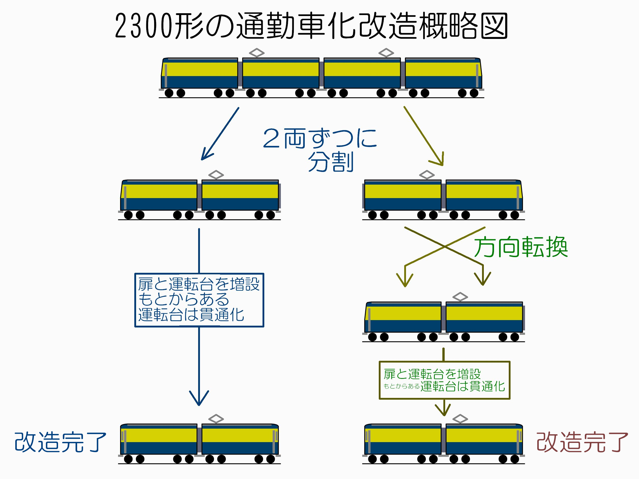 小田急電鉄2300形の組成変更を示した図